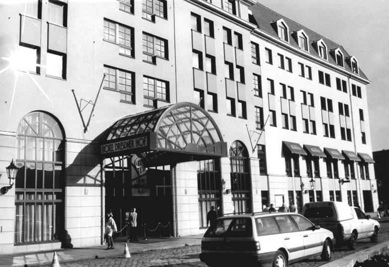 Dresden, Hotel „Dresdner Hof“ ADN-ZB Häßler 25.1.90-We-Dresden: Hotelneubau. Das Hotel „Dresdner Hof“ wird am 26.1. eröffnet. Der Bau im historischen Zentrum von Dresden gelegen, gibt der Stadt ein markantes Gepräge. Den Gästen stehen 333 komfortabel eingerichtete Zimmer zur Verfügung. Blick auf die Eingangszone des Hotels.